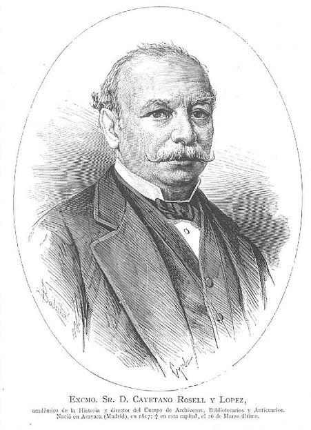 Retrato de Cayetano Rosell y López, en La Ilustración Española y Americana.